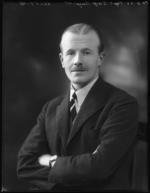 Lord Dennam